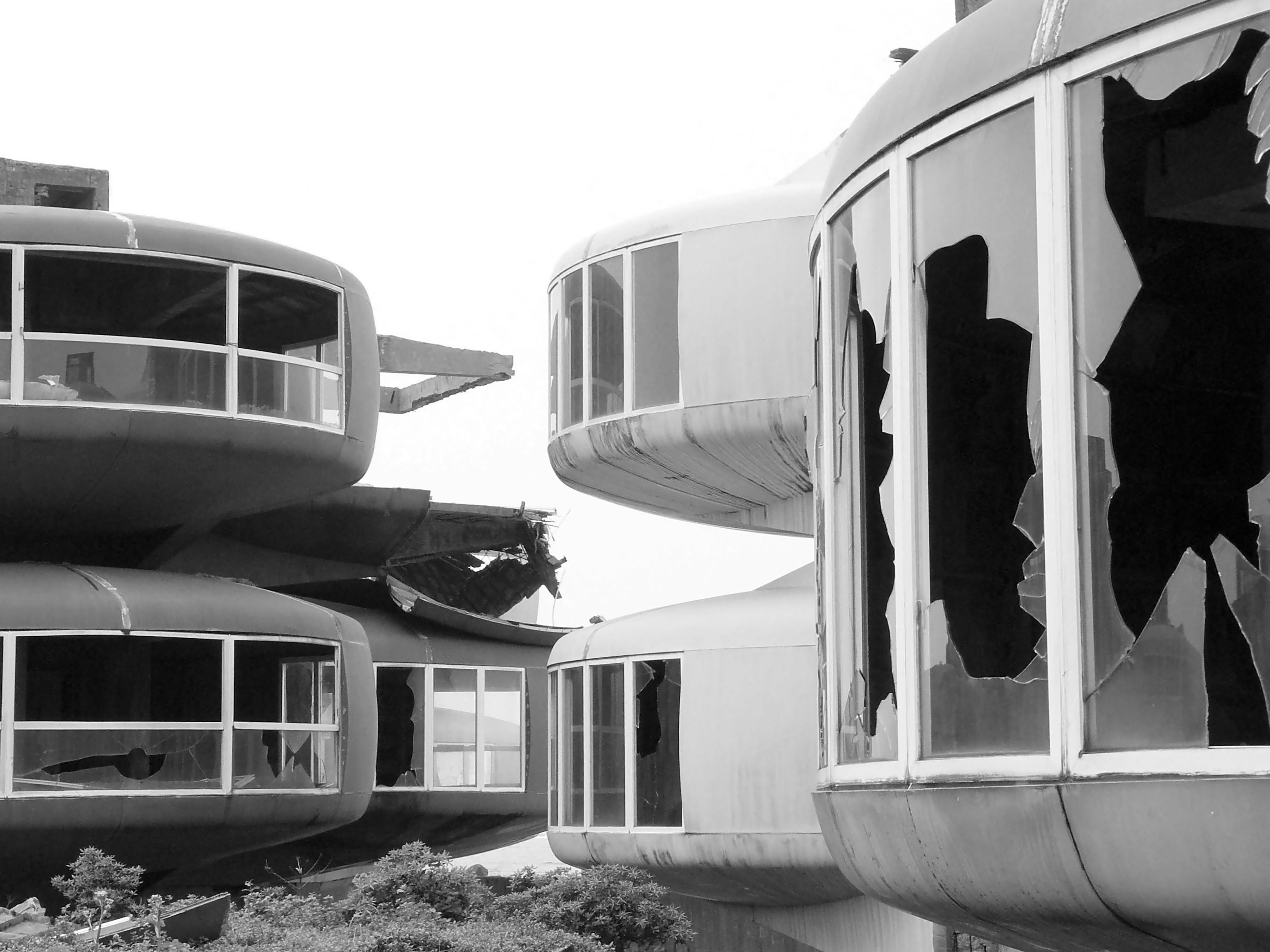 UFO House, Sanjhih, Taiwan